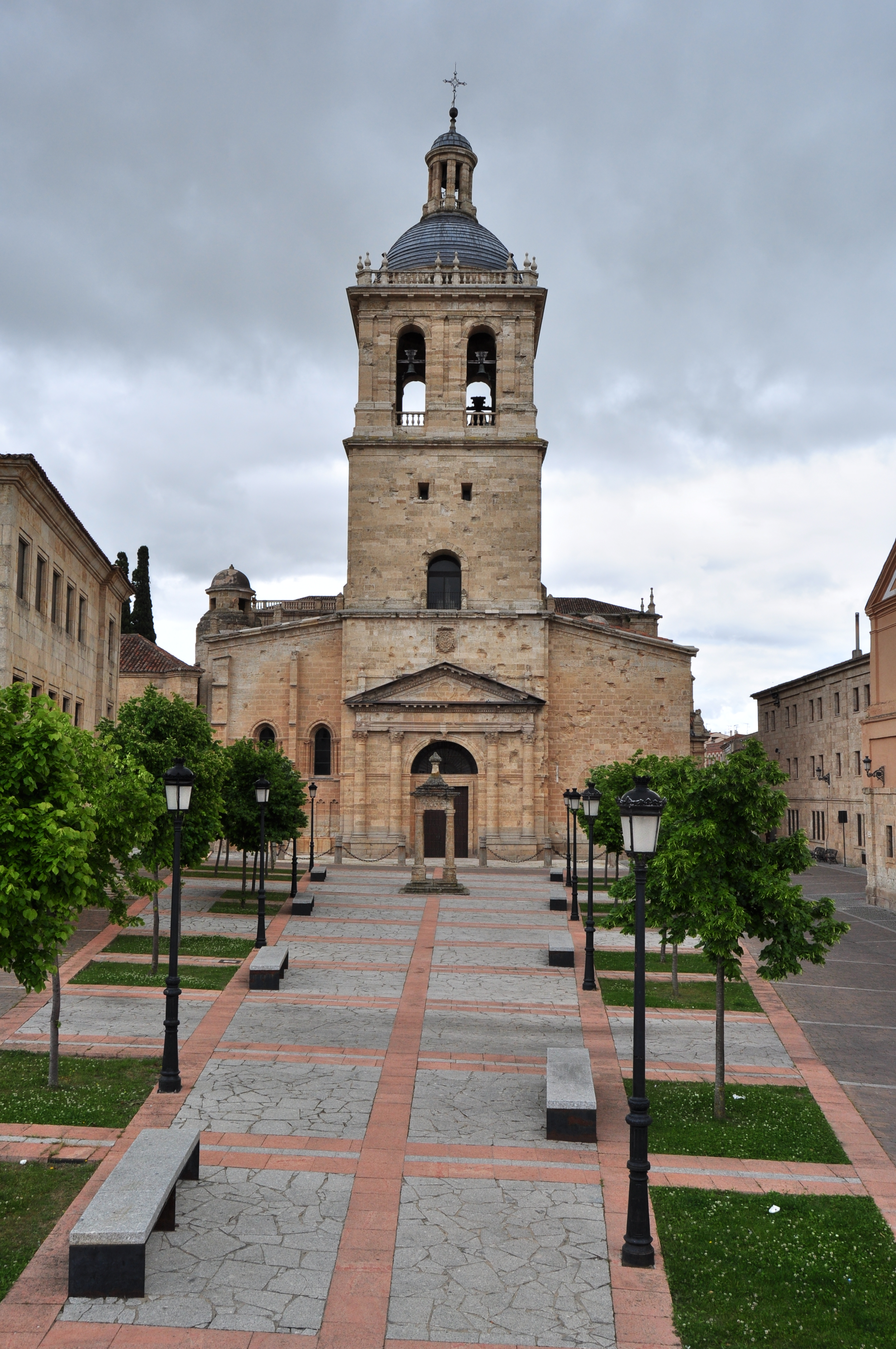 Ciudad Rodrigo - 001